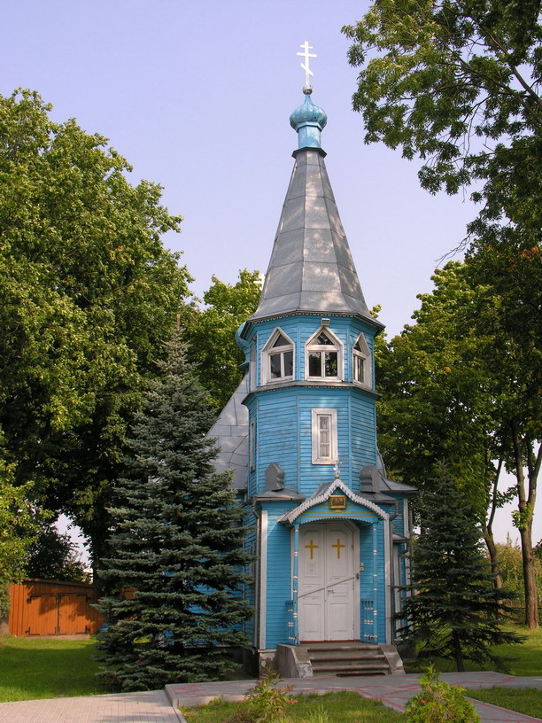 Mažeikių Šventosios Dvasios cerkvė, past. 1894 m. Foto Algirdas, 2005-09-08